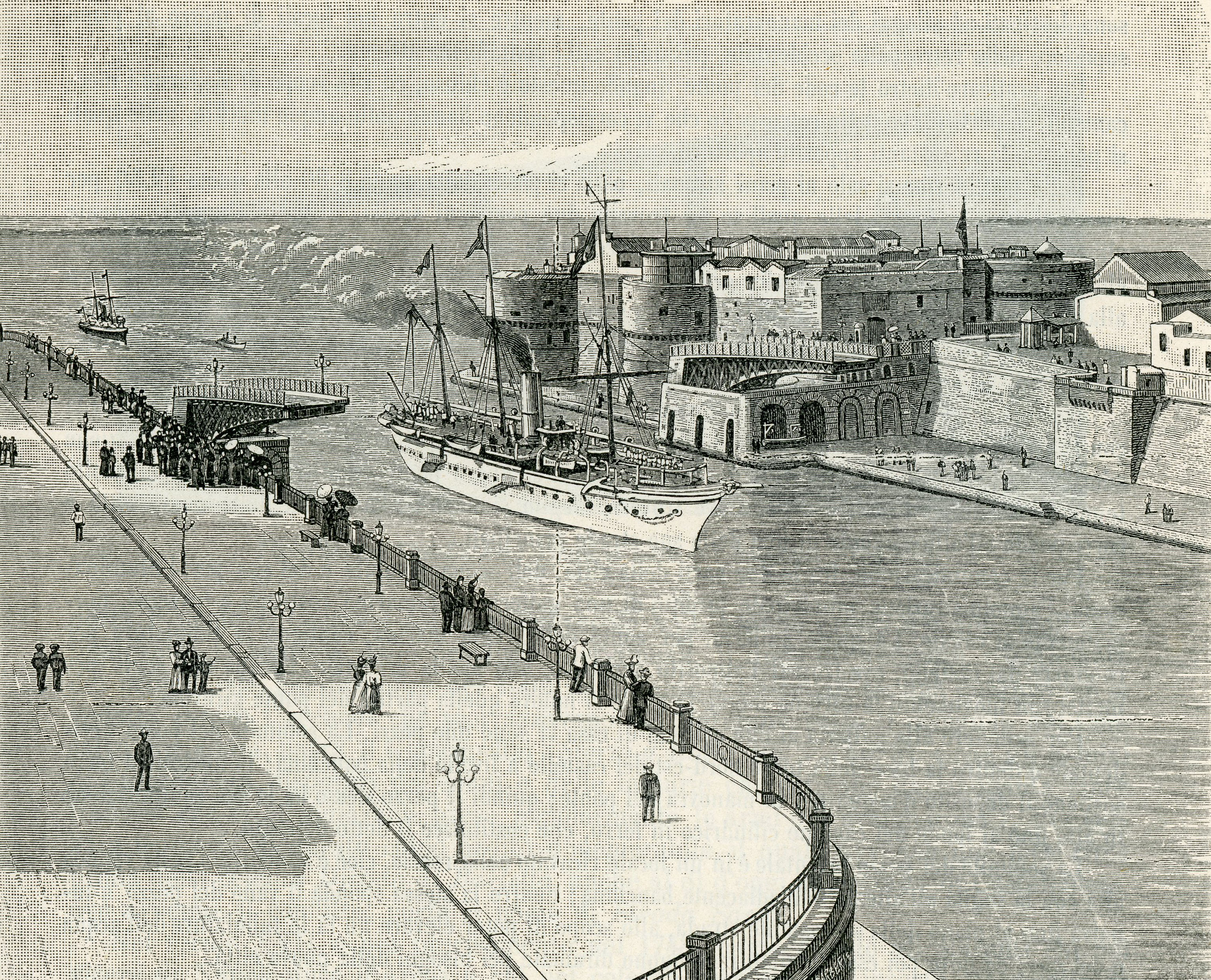 Taranto: Veduta del Canale col Ponte aperto all’atto del passaggio della R. Nave Savoia. (xilografia di Barberis)